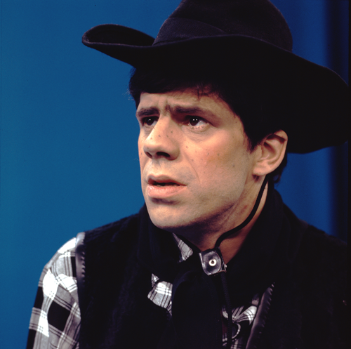 Joost Prinsen in de Stratemakeropzeeshow